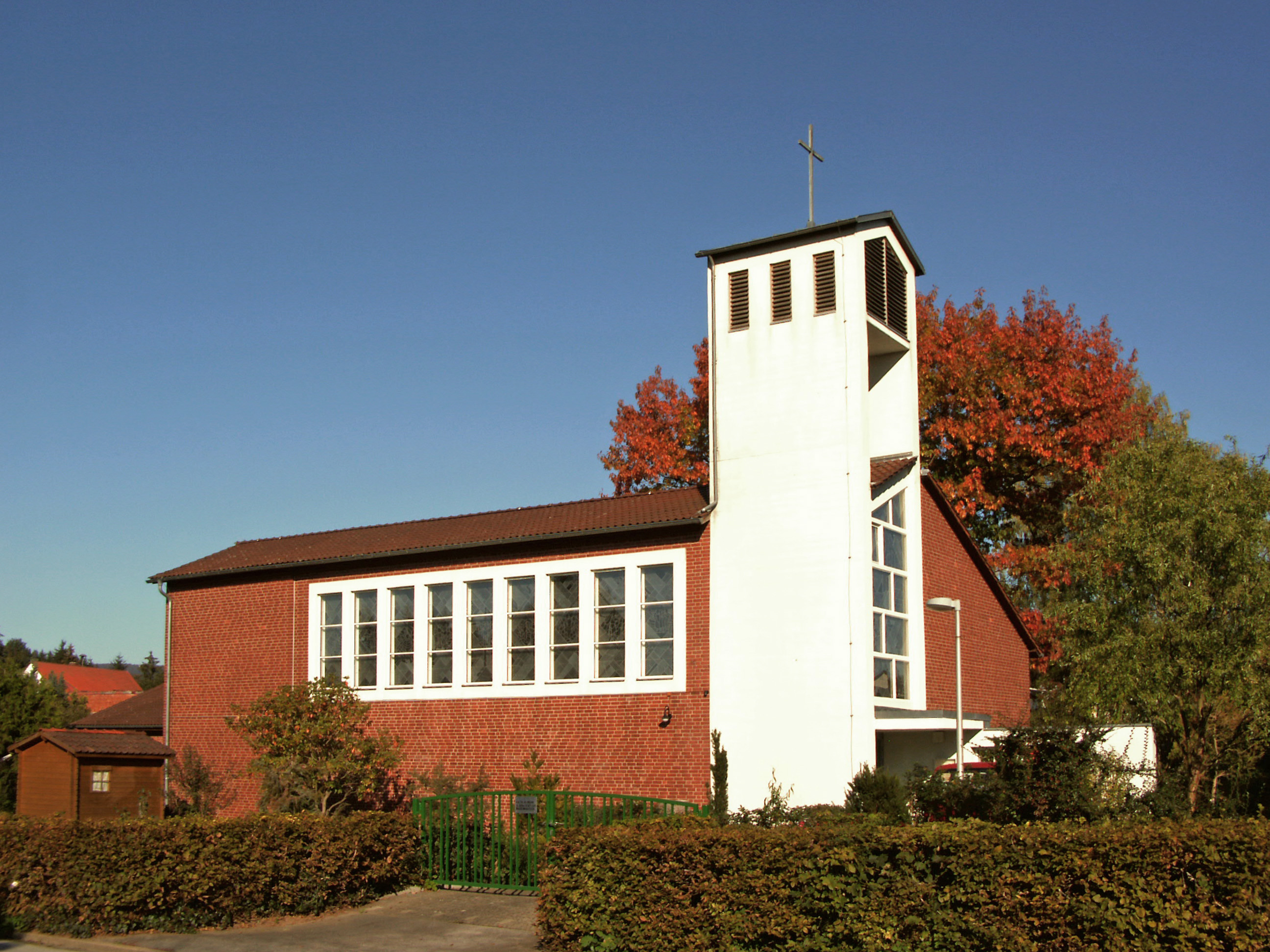 Katholische Kirche St. Bonifatius in Badenhausen, Landkreis Osterode, Westseite